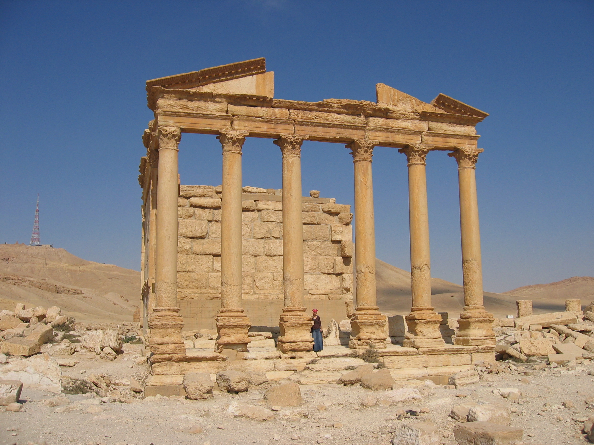 Peristyl House Palmyra Syria